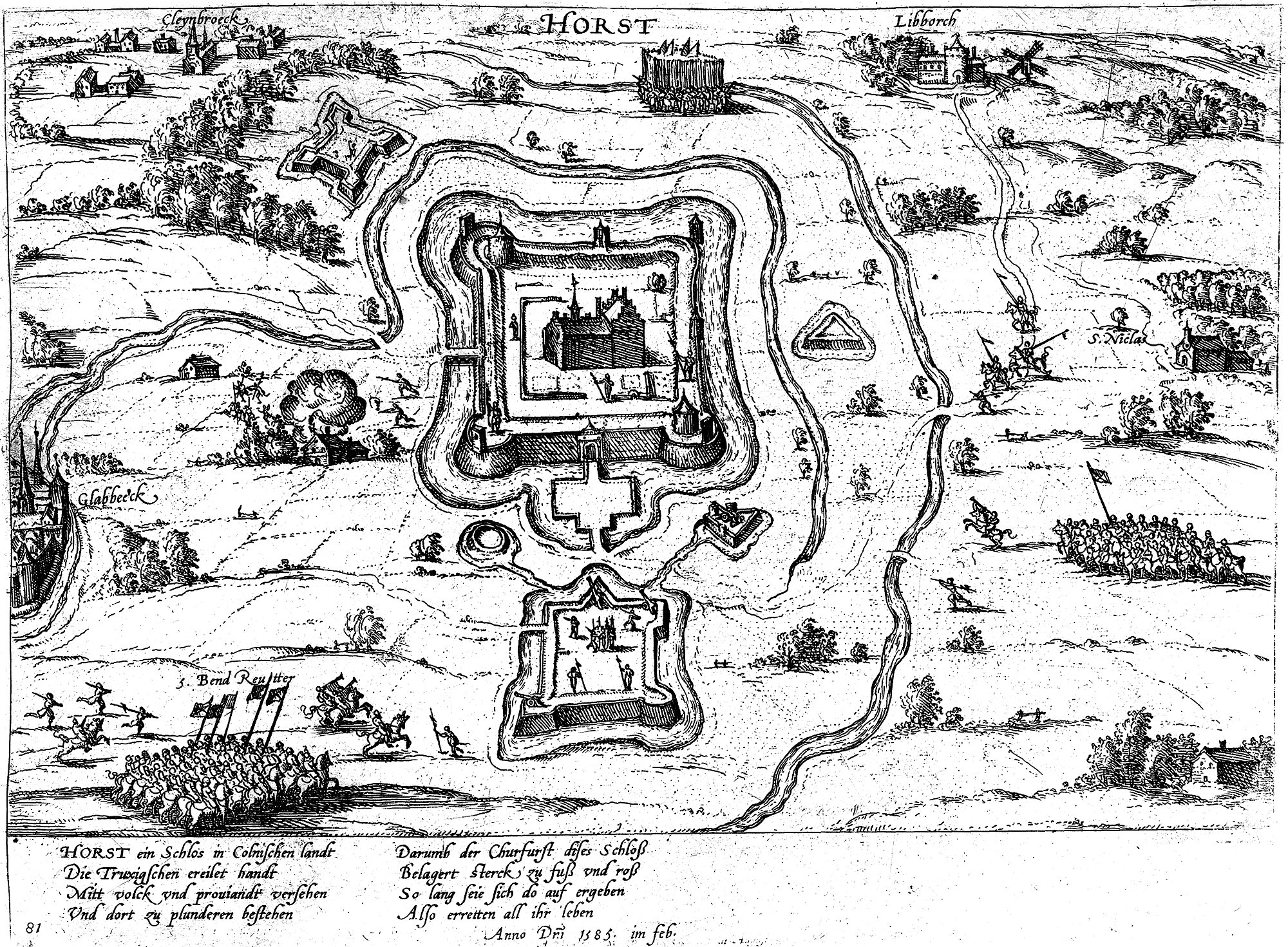 Belagerung des Hauses Horst im Jahr 1585 im heutigen Mönchengladbach-Giesenkirchen